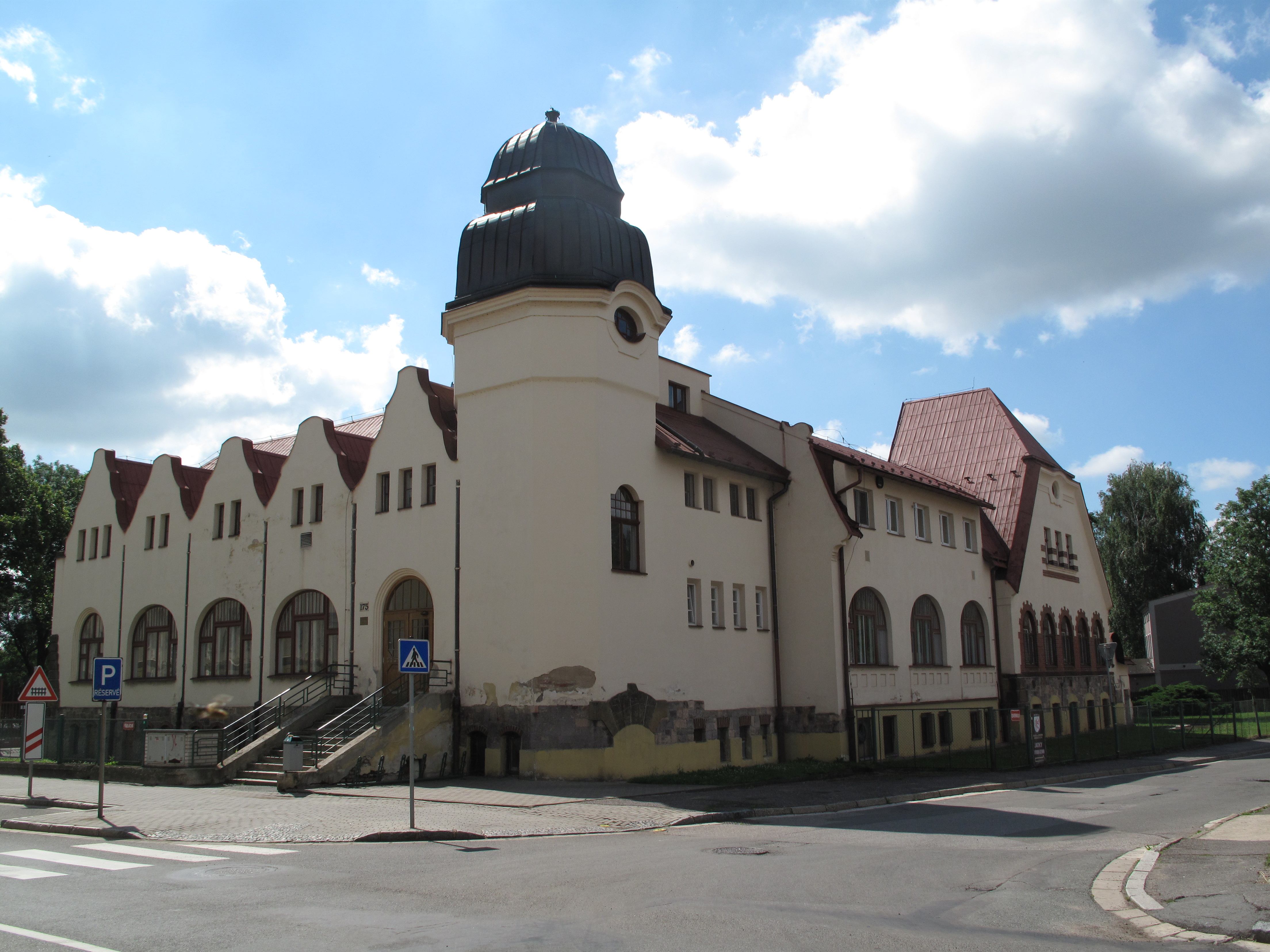 Přadlácká 175, 550 01 Broumov – Velká Ves